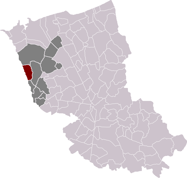 Locatie gemeente Sint-Pietersbroek in arrondissement Duinkerke. Zelfgemaakt. Location of Saint-Pierre-Brouck municipality in the arrondissement of Dunkirk. Self made. Localisation de la commune de Saint-Pierre-Brouck dans l'arrondissement de Dunkerque. Fait moi-même.